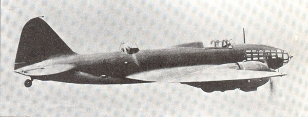 Bombardero Ilyushin Il-4